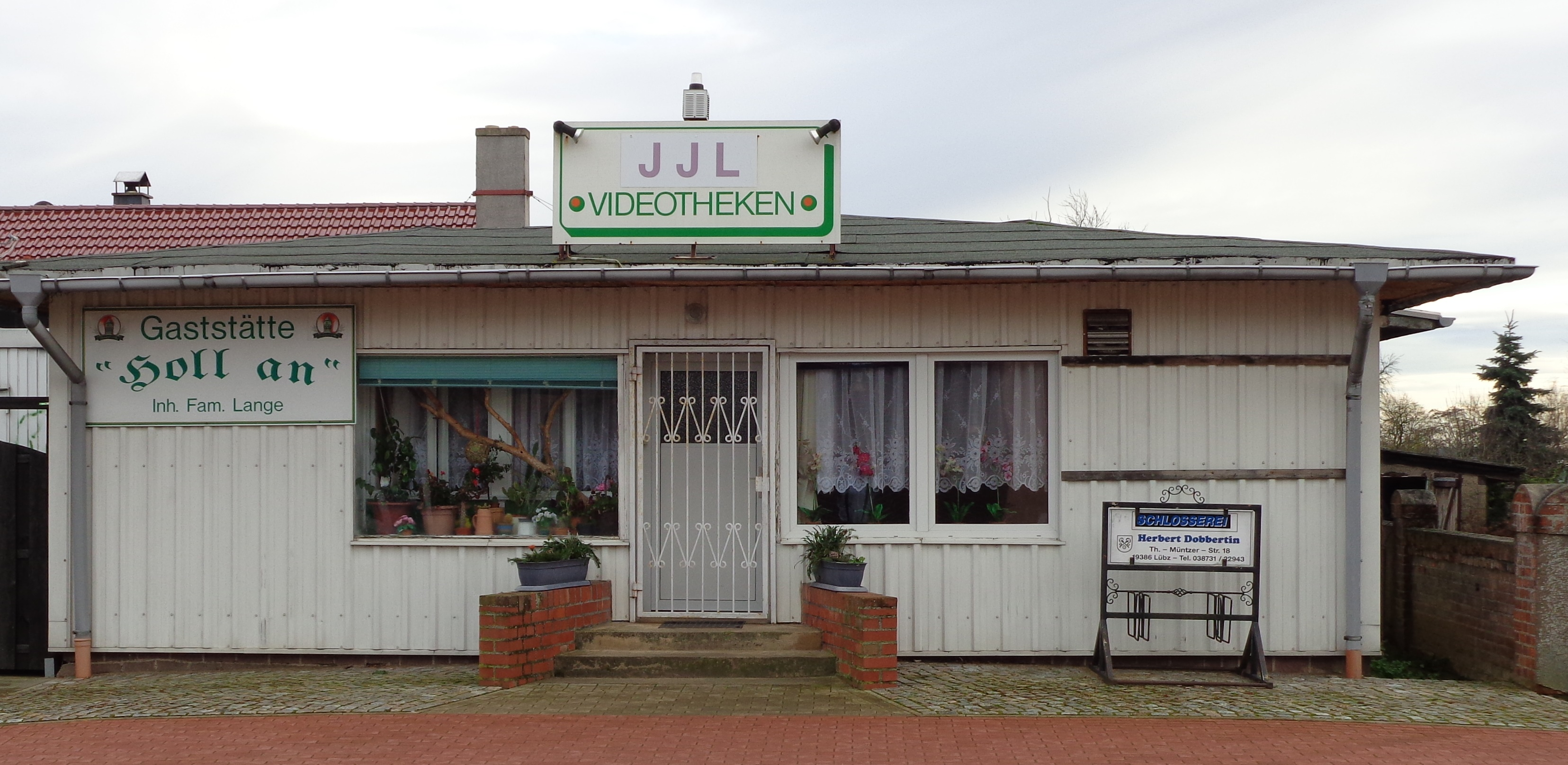 Fotografie eines Videothekenkiosks in Lutheran, Mecklenburg